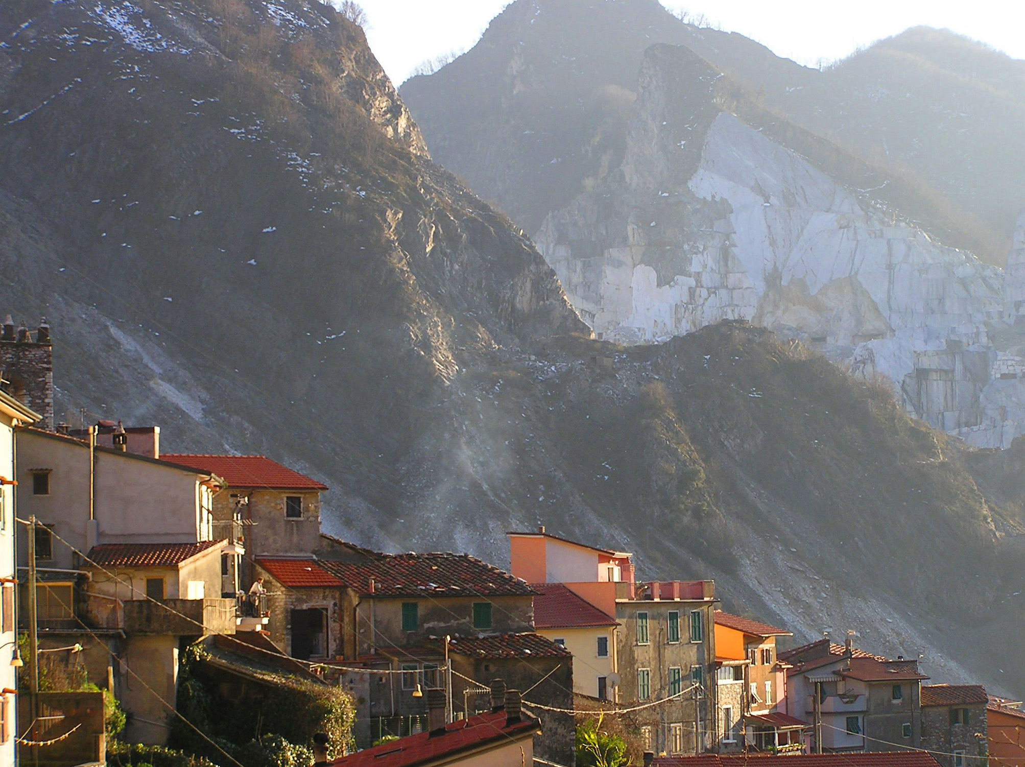 Colonnata, frazione di Carrara, Toscana - Italia.